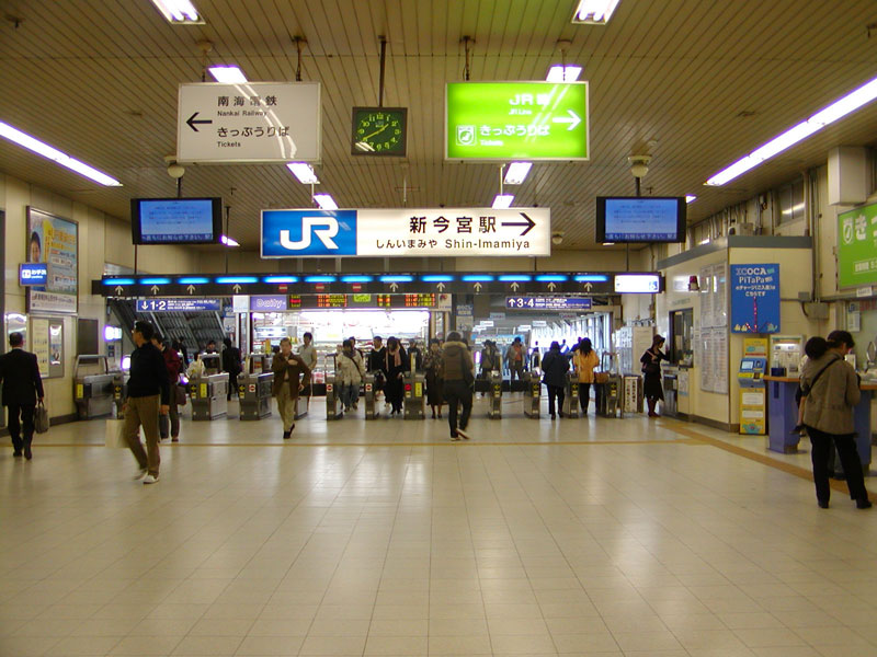 JR新今宮駅 西口。大阪市浪速区